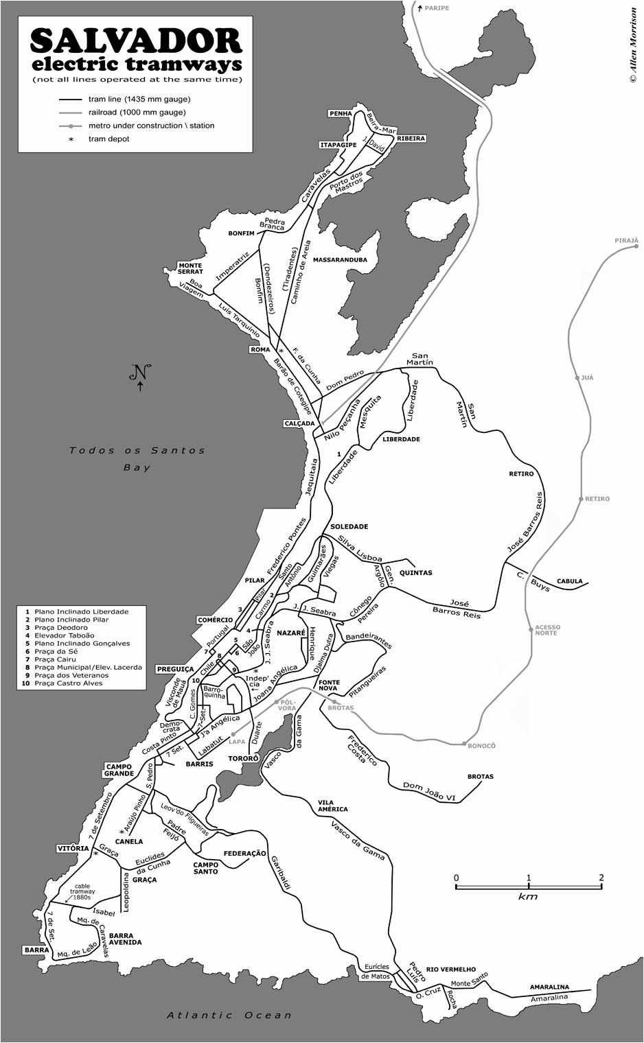 ehemaliges Tramnetz von Salvador